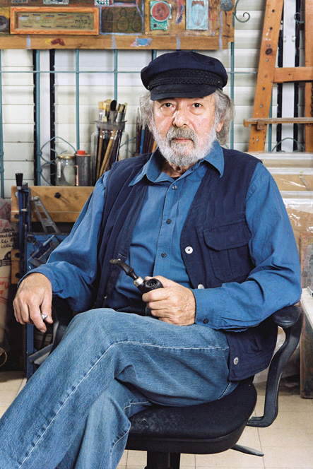 יעקב פורת - בסטודיו ביפו